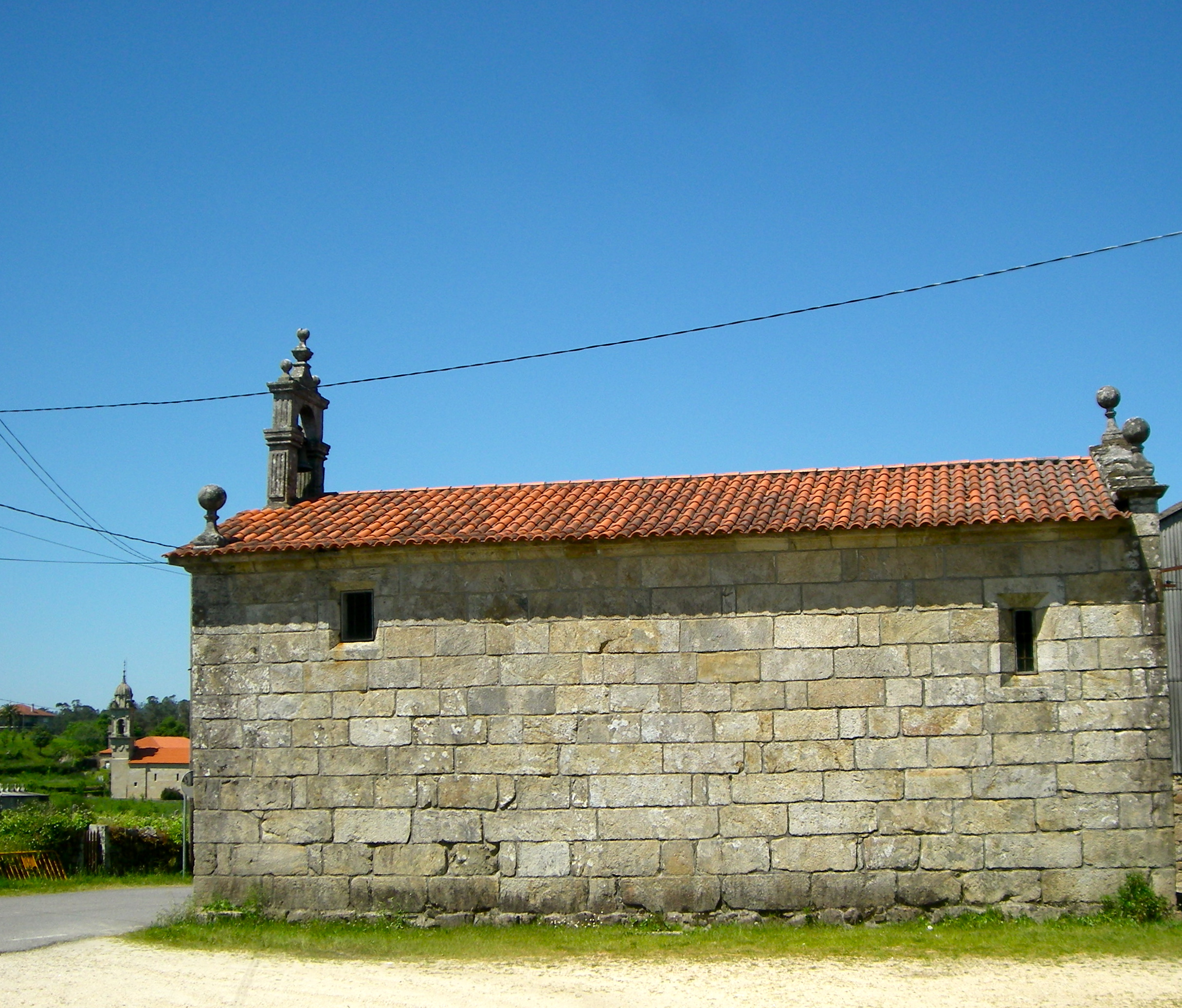 Capela de San Idelfonso